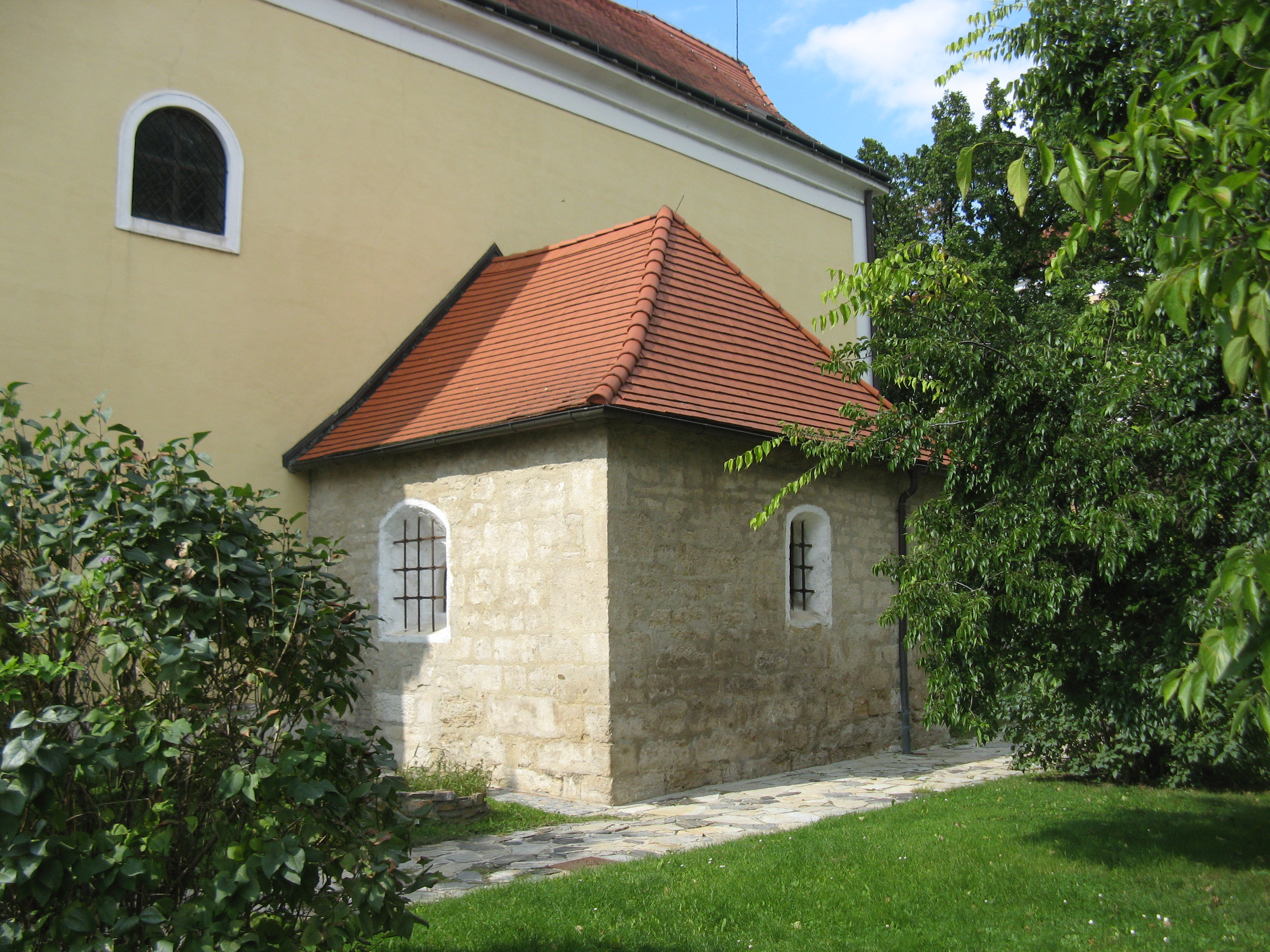 Taufkapelle an der Pfarrkirche Vösendorf, Niederösterreich